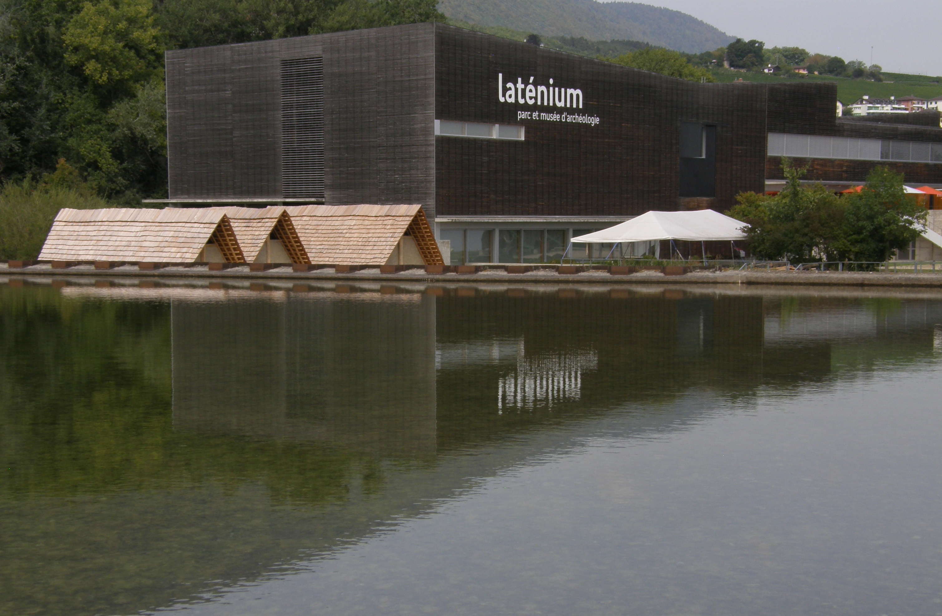 Le Laténium se reflète dans l'étendue d'eau, côté sud.